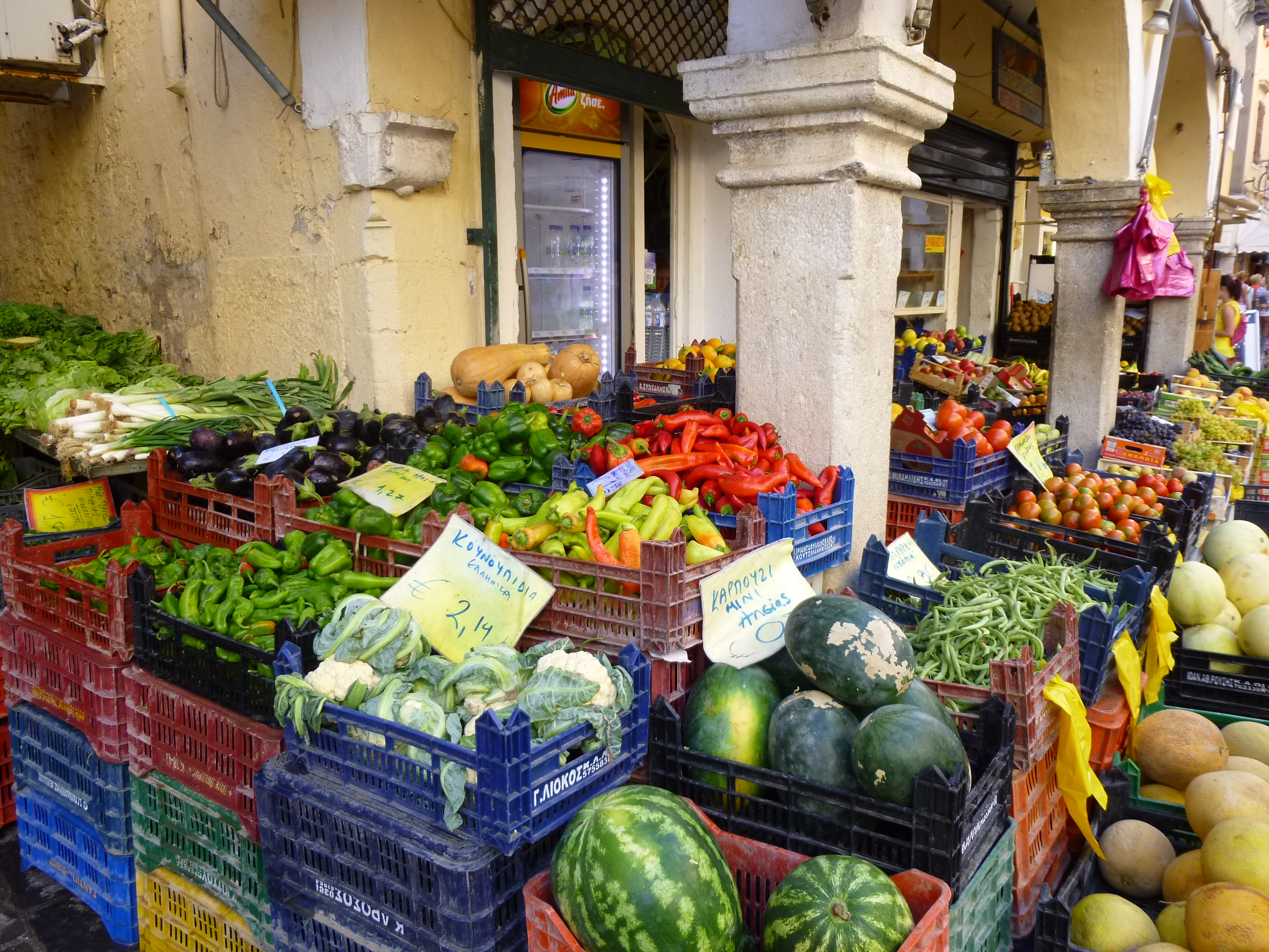 Obst- und Gemüsestand in Korfu-Stadt